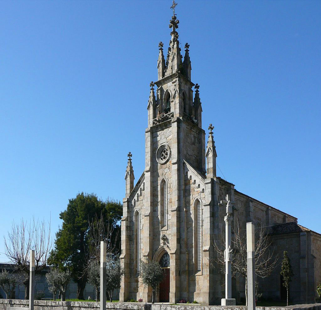 Pontevedra. Igrexa de Placeres